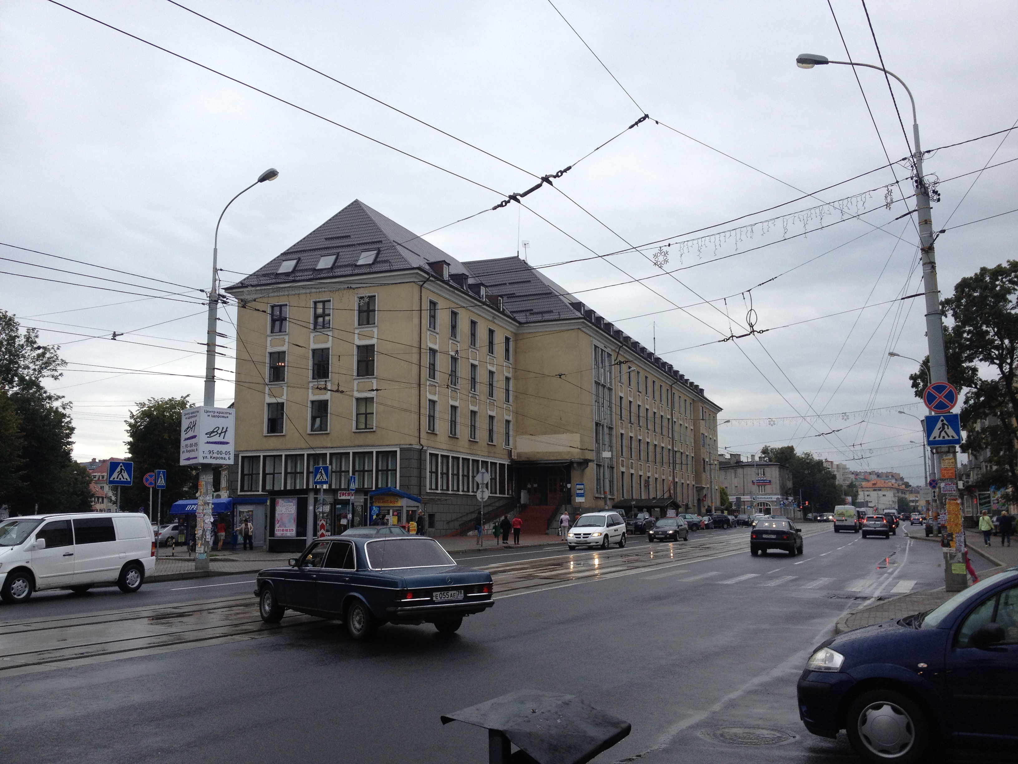 Здание сельскохозяйственного товарищества (Калиниградская область, Калининград, советский пр., 13)